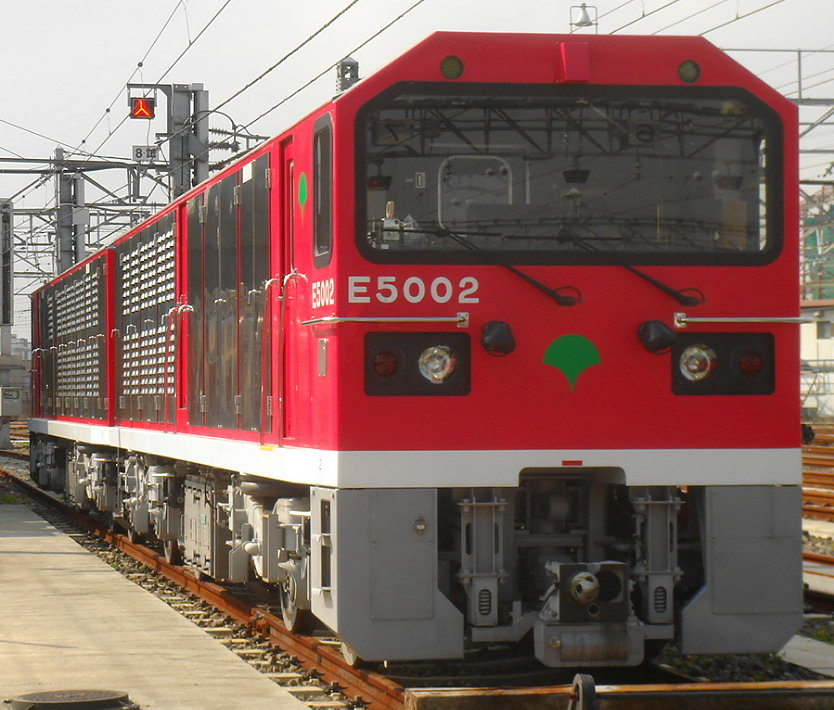 東京都交通局E5000形電気機関車 2006年10月28日に馬込車両検修場の公開イベント『都営フェスタ'06 in 浅草線』で午前中に撮影 一部編集の上で2006年12月29日にアップロード